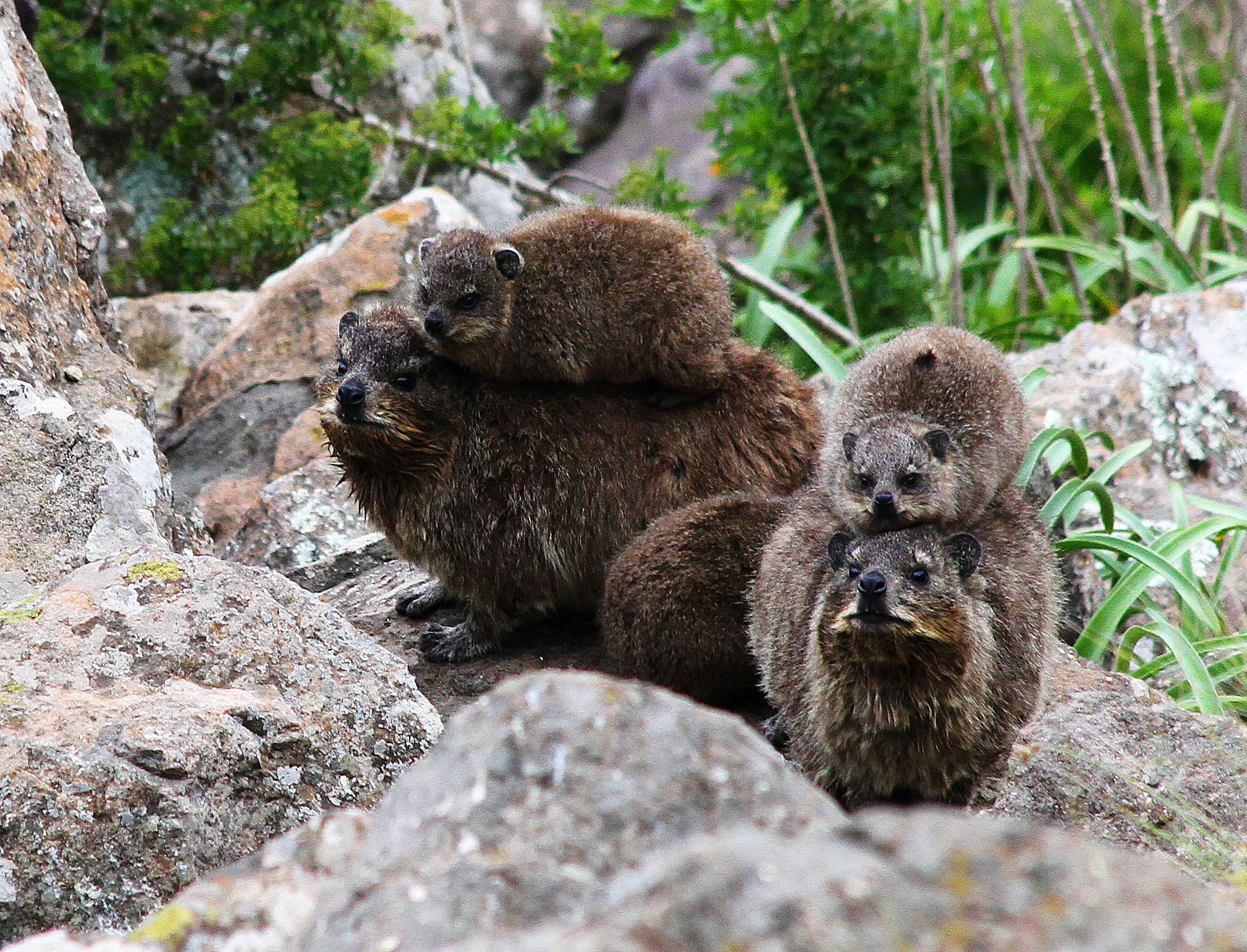 Rock Hyraxes